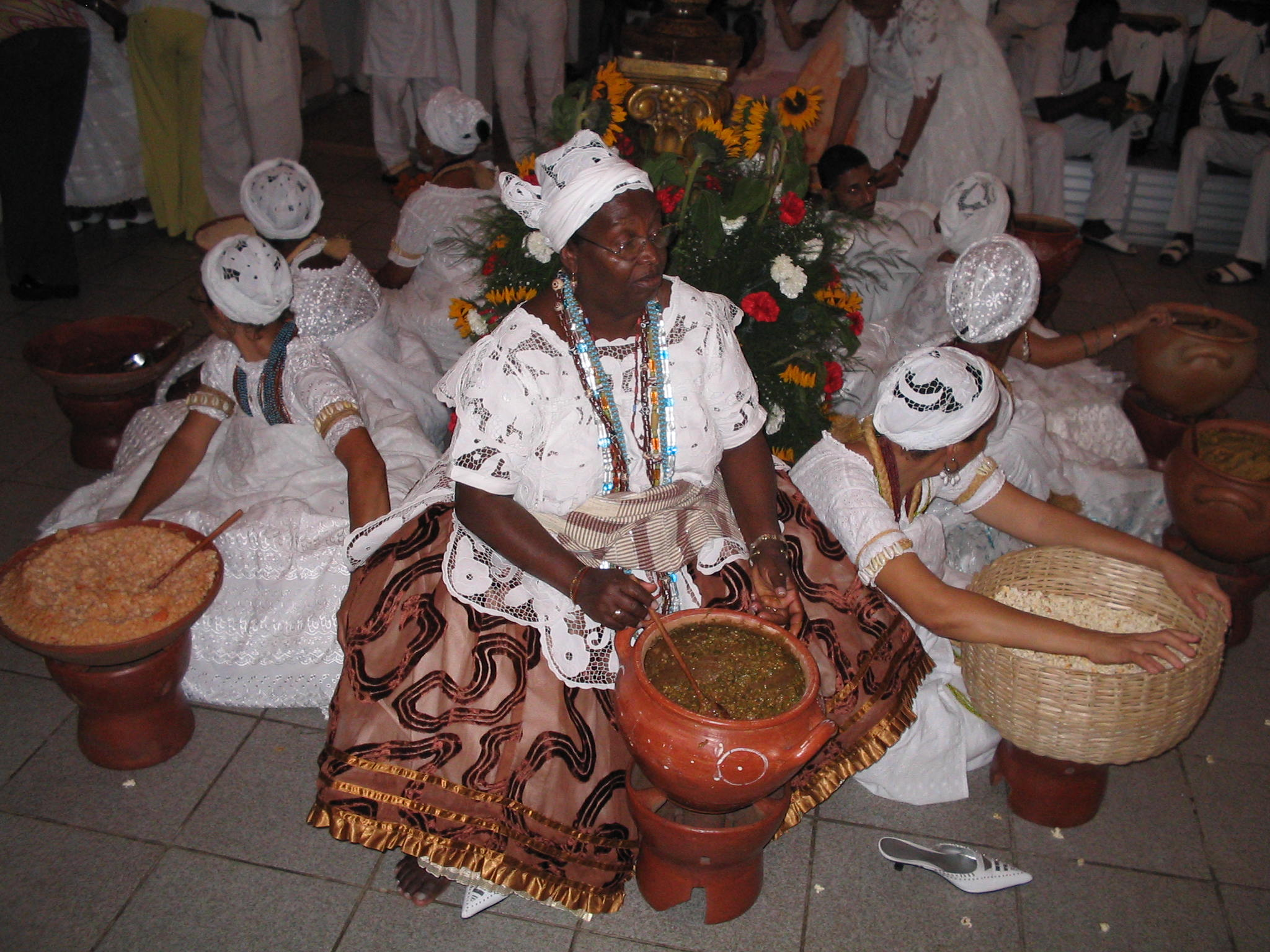 Olubajé-Festa de Obaluayê no Candomblé, Bahia, Brasil